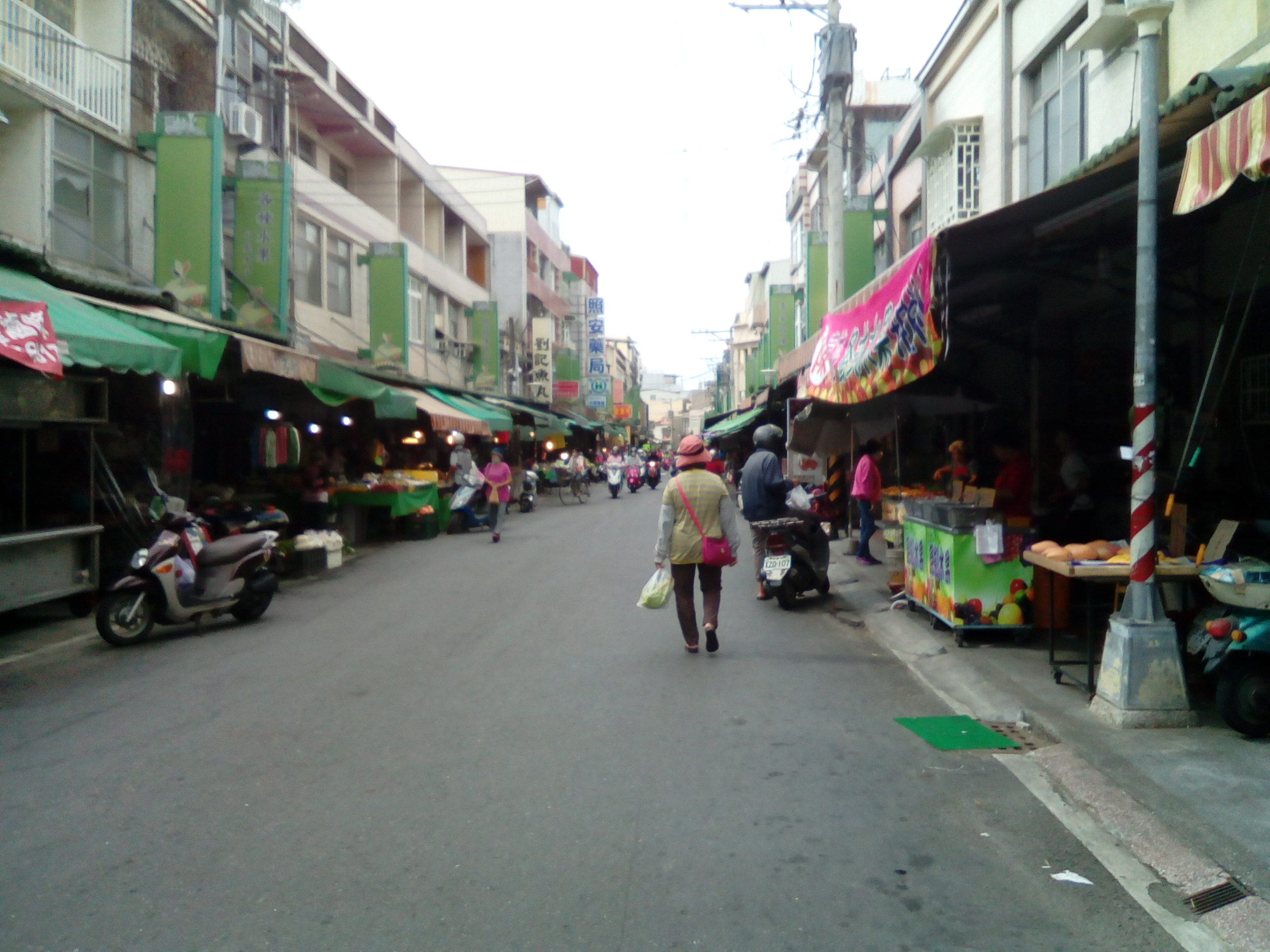 中文（台灣）: 橋頭老街即高雄市橋頭區橋南路。